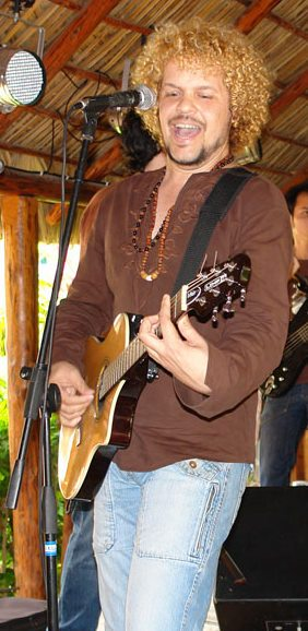 Presentación del nuevo disco de David Torrens, Razones.